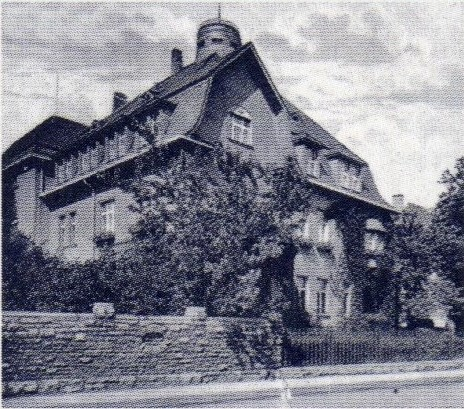 Villa Max von Bleichert in Leipzig, Rosentalgasse 17 (um 1930). Das 1909 errichtete Gebäude wurde in den 1930er-Jahren abgerissen.